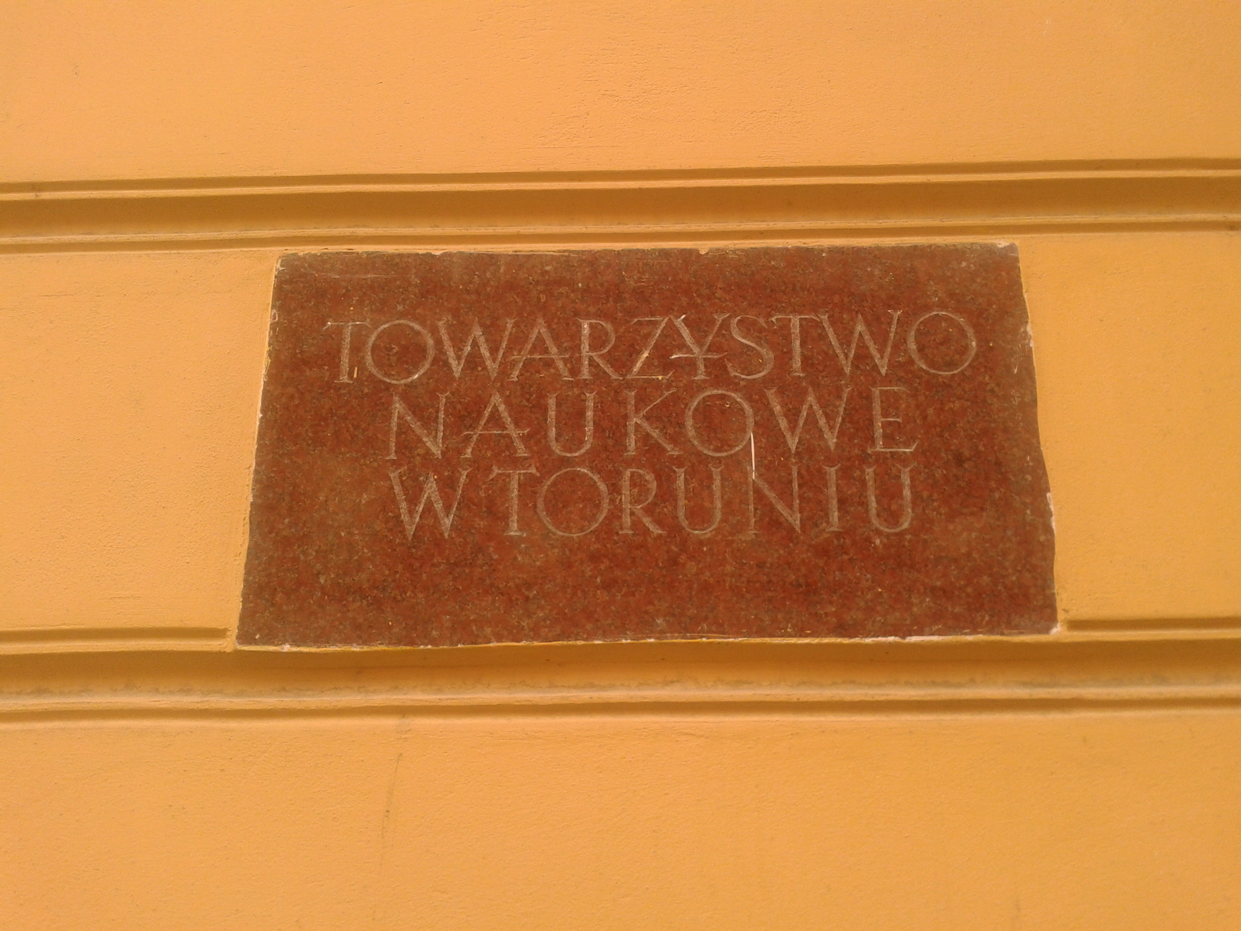 Tablica Towarzystwa Naukowego w Toruniu pod adresem ulica Wysoka 16 w Toruniu strona)